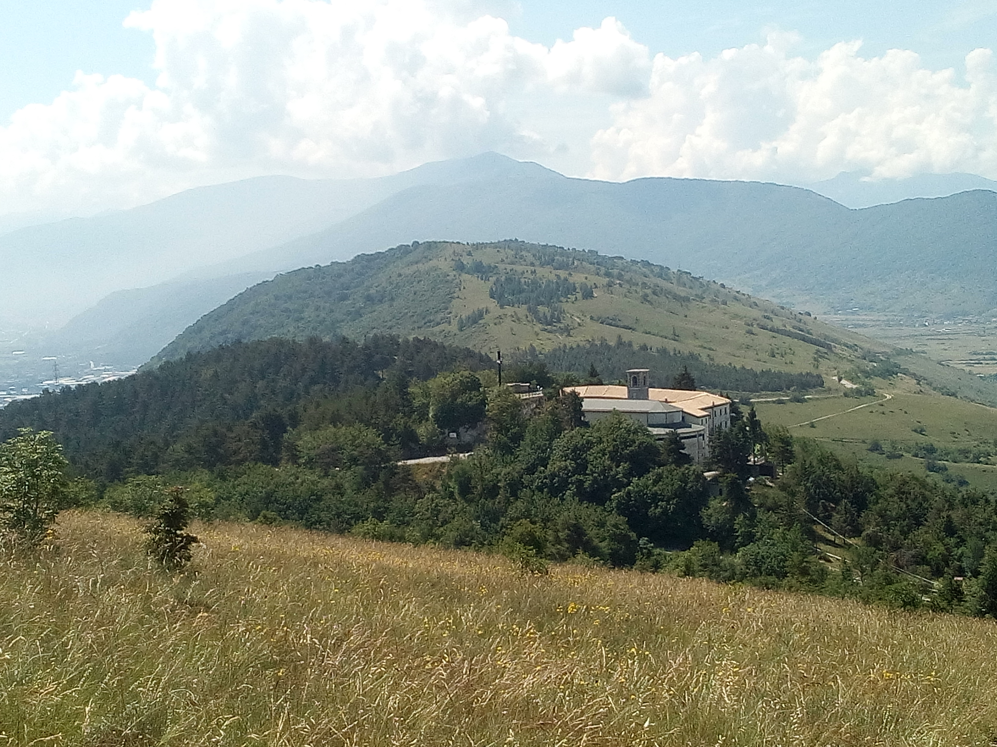 Nucleo di Pietraquaria